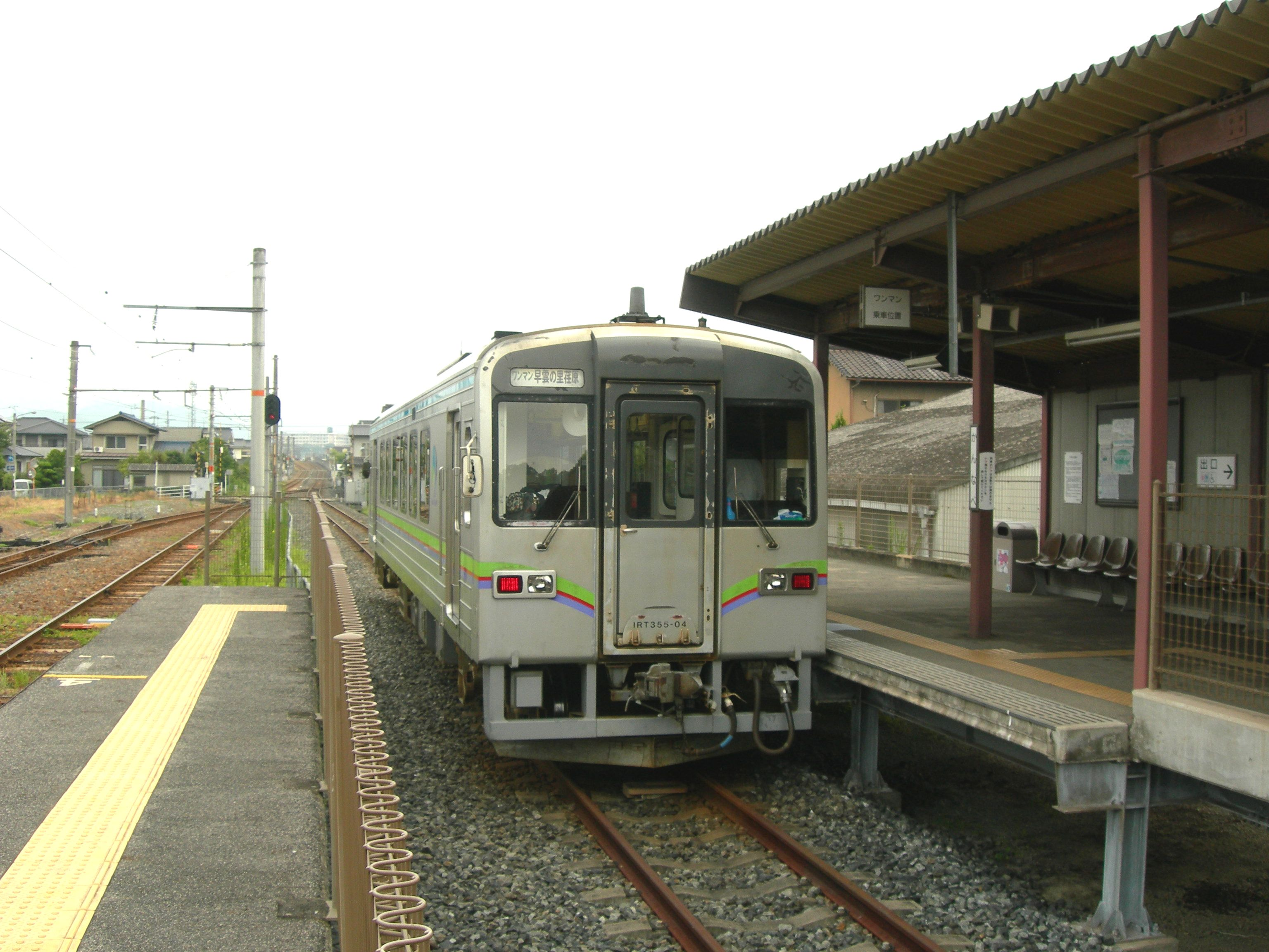 井原鉄道神辺駅ホーム